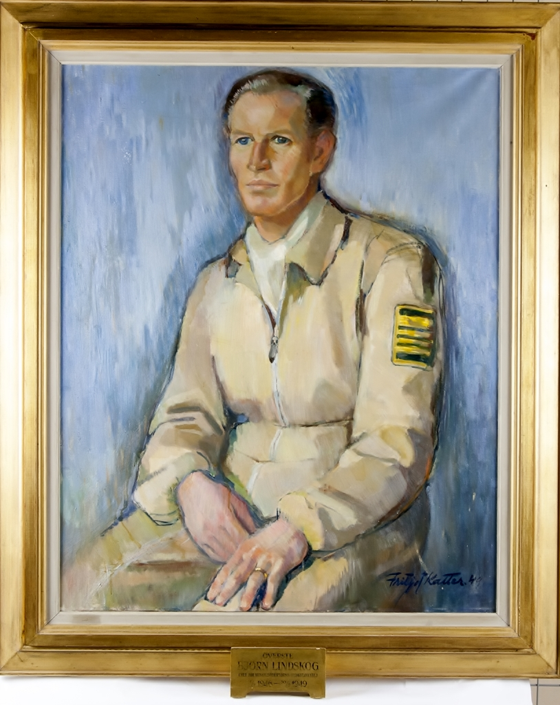 Överste Björn Lindskog, flottiljchef på F 18 åren 1946-1949